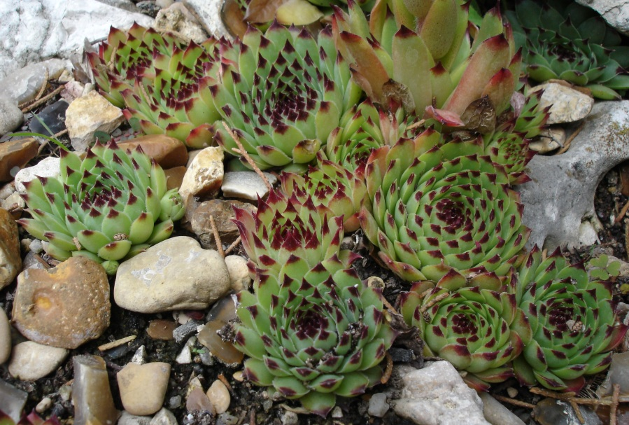 Sempervirum calcareum, Jardin alpin, Jardin des Plantes de Paris